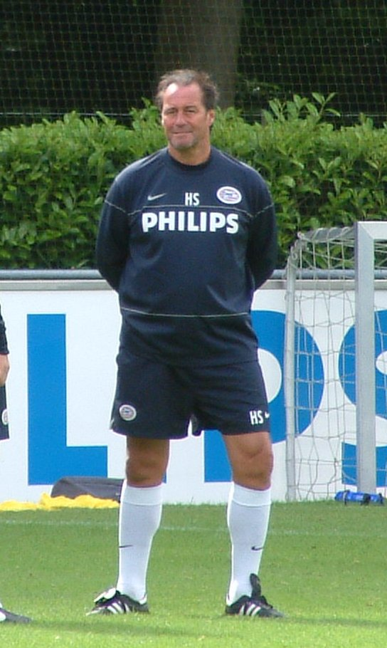 Huub Stevens, trainer van PSV.